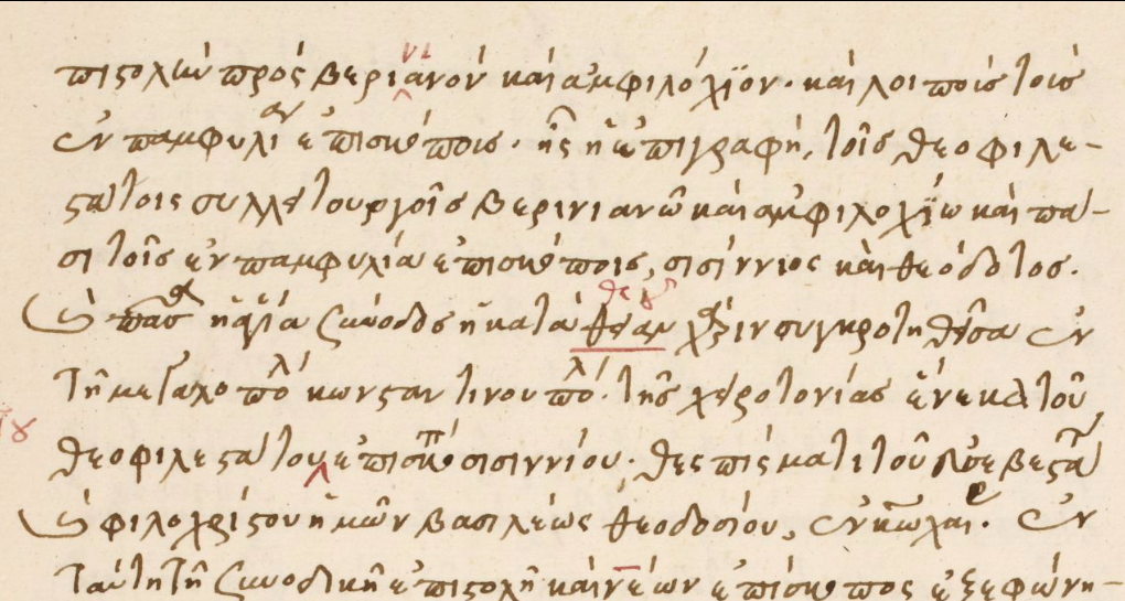 Сисинний Константинопольский и Феодот Антиохийский объединенное письмо Вериниану, Амфилохию и остальной части епископов Памфилии, адресованное нашим коллегам, «любимым Богом, Вериниану, Амфилохию, и остальной части епископов в Памфилии: Сисинний, Феодот, и всему священному собору, который волею Бога был собран в могущественном городе Константинополе, чтобы посвятить самого святого Сисинния, любимого Богом, и нашего императора Феодосия, любимого Христом, приветствуют Вас в Боге» («Τοῖς θεοφιλεστάτοις συλλειτουργοῖς Βερινιανῷ καὶ Ἀμφιλοχίῳ, καὶ πᾶσι τοῖς ἐν Παμφυλίᾳ ἐπισκόποις, Σισίννιος καὶ Θεόδοτος καὶ πᾶσα ἡ ἁγία σύνοδος ἡ κατὰ θεοῦ χάριν συγκροτηθεῖσα ἐν τῇ μεγαλοπόλει Κωνσταντινουπόλει τῆς χειροτονίας ἕνεκα τοῦ θεοφιλεστάτου καὶ ἁγιωτάτου ἐπισκόπου Σισιννίου, θεσπίσματι τοῦ εὐσεβεστάτου καὶ φιλοχρίστου ἡμῶν βασιλέως Θεοδοσίου ἐν κυρίῳ χαίρειν.») Рукопись XVI века. Фотий I (патриарх Константинопольский). Мириобиблион. Кодекс . 52. Постановления собора в Сиде против мессалиан. Британская библиотека.